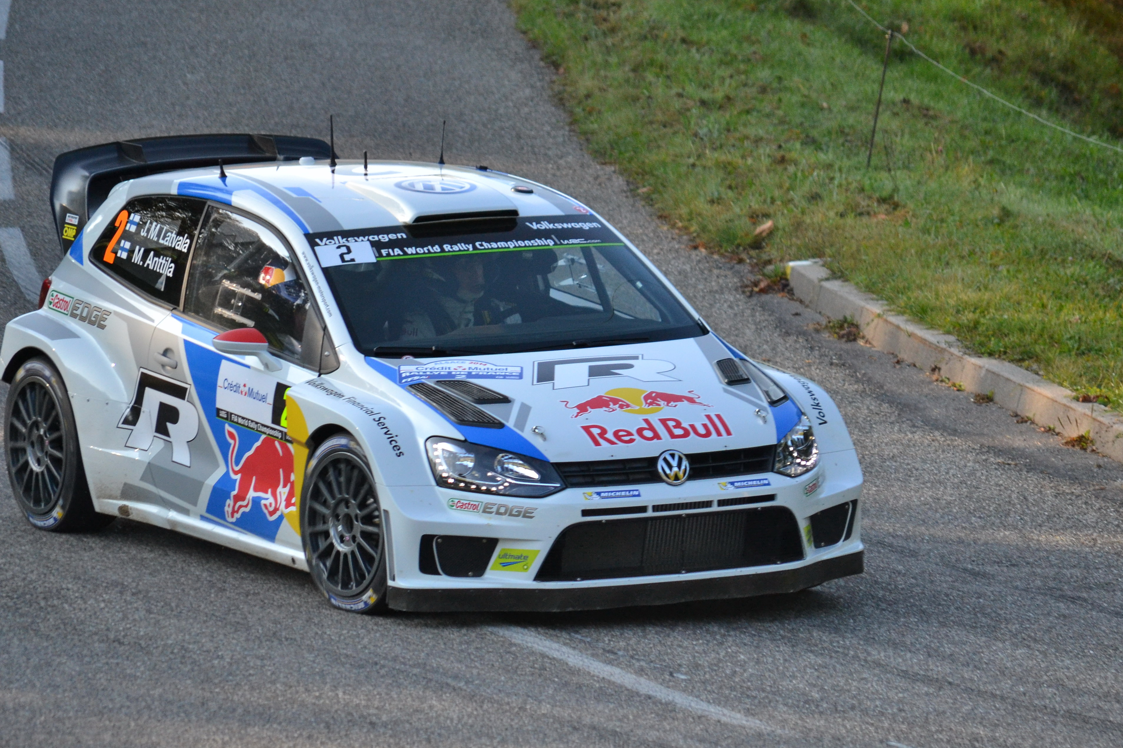 Rallye WRC France-Alsace 2014, ES9 Soultzeren - Le Grand Hohnack 1 à Labaroche. Volkswagen Polo R WRC - Jari-Matti Latvala - Miikka Anttila